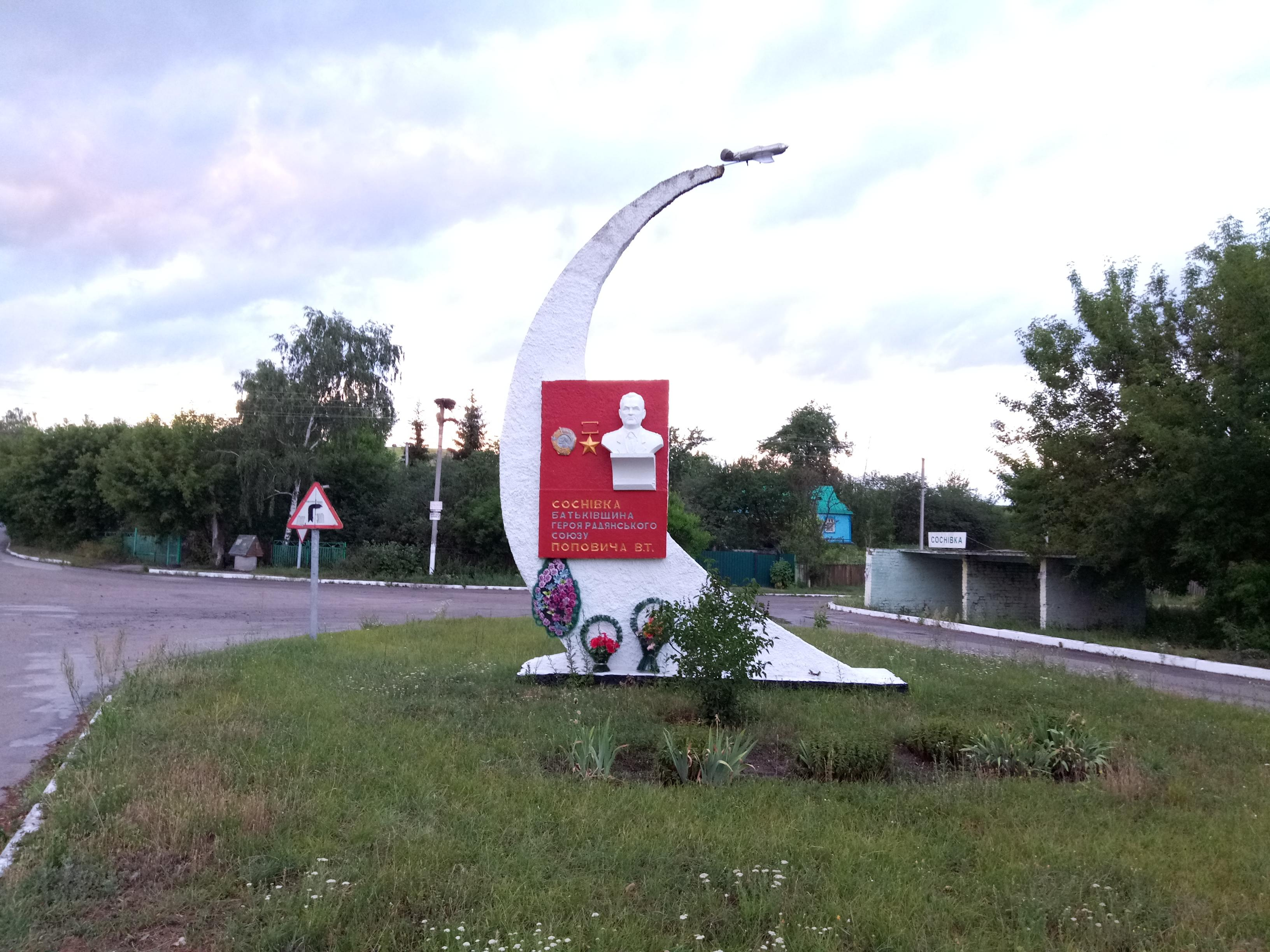 Пам'ятник Поповичу Володимиру Трофимовичу